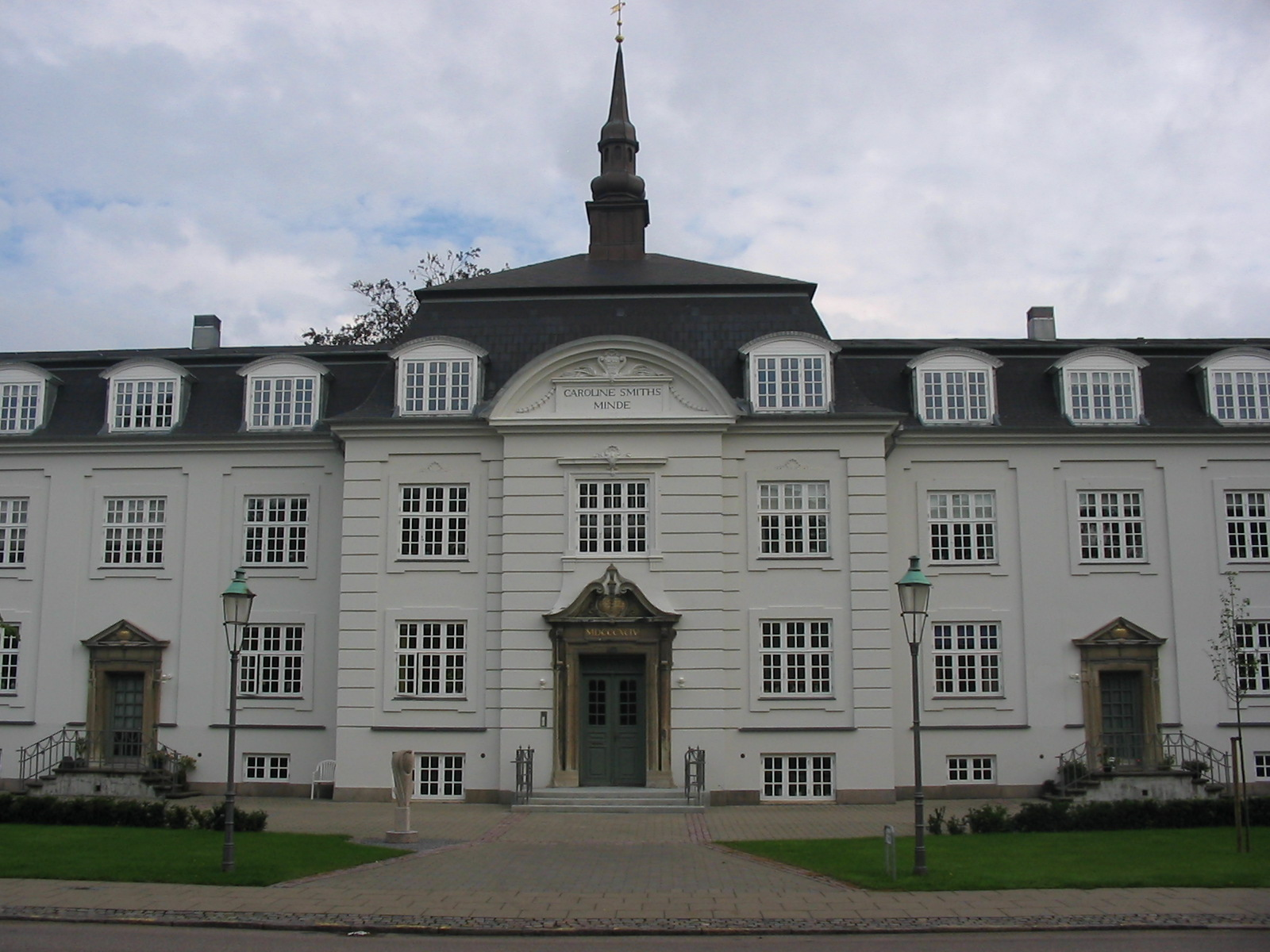 Aalborg Caroline Smiths Minde Arkitekt: Ole Peter Momme